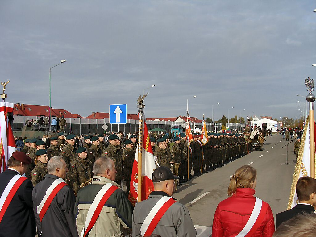 Uroczystość nadania nowo otwartej ulicy w Szczecinie imienia gen. Stanisława Sosabowskiego. Szczecin, 18.10.2008